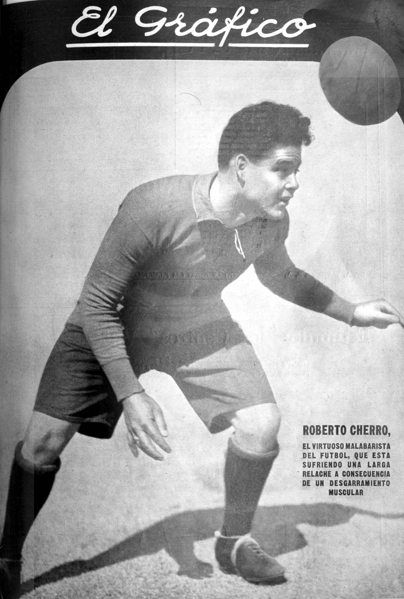 El Grafico del 21 de Septiembre de 1929. Edicion 533